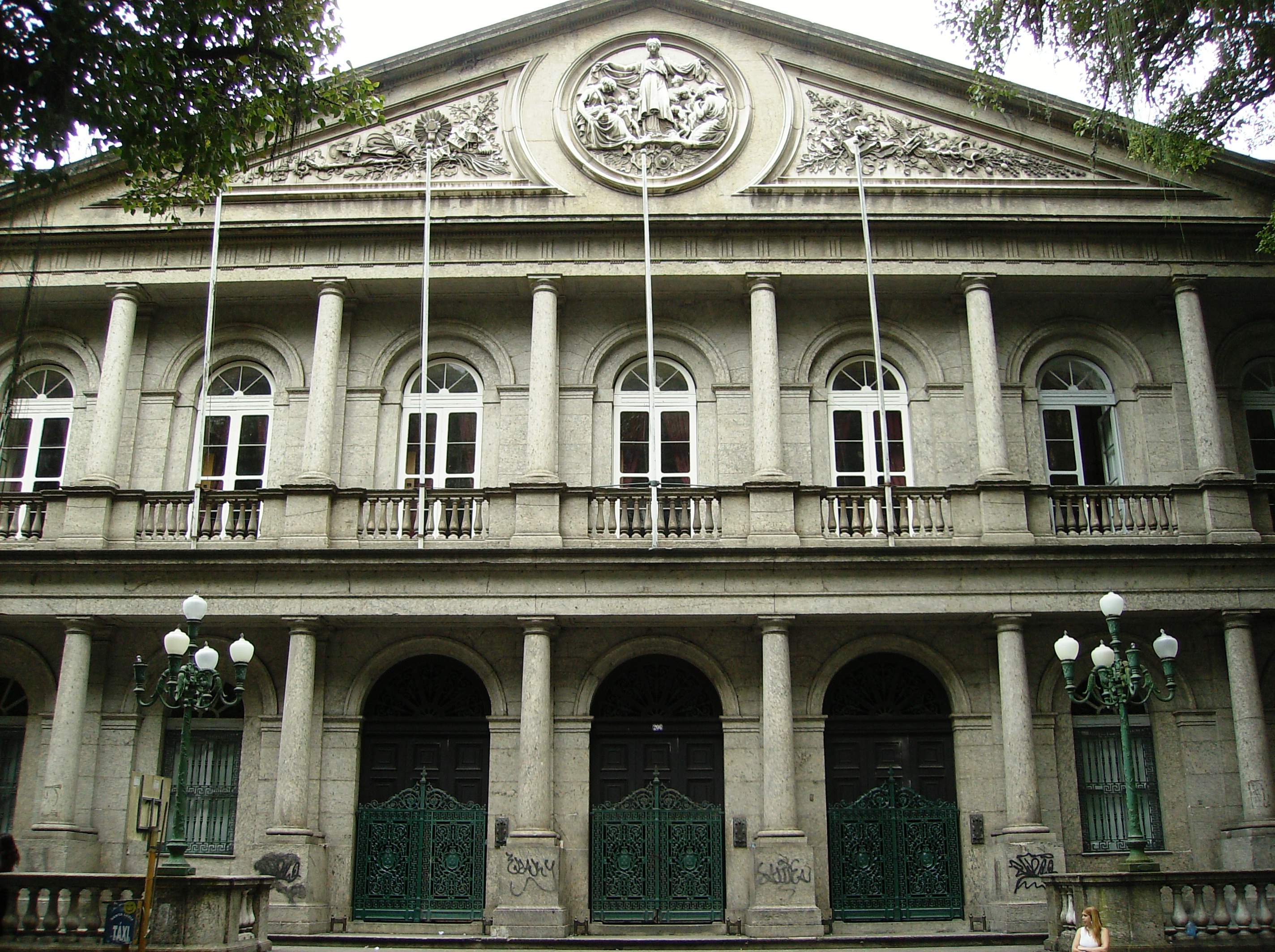 Santa Casa de Misericórdia do Rio de Janeiro, RJ, Brasil: vista da entrada principal.